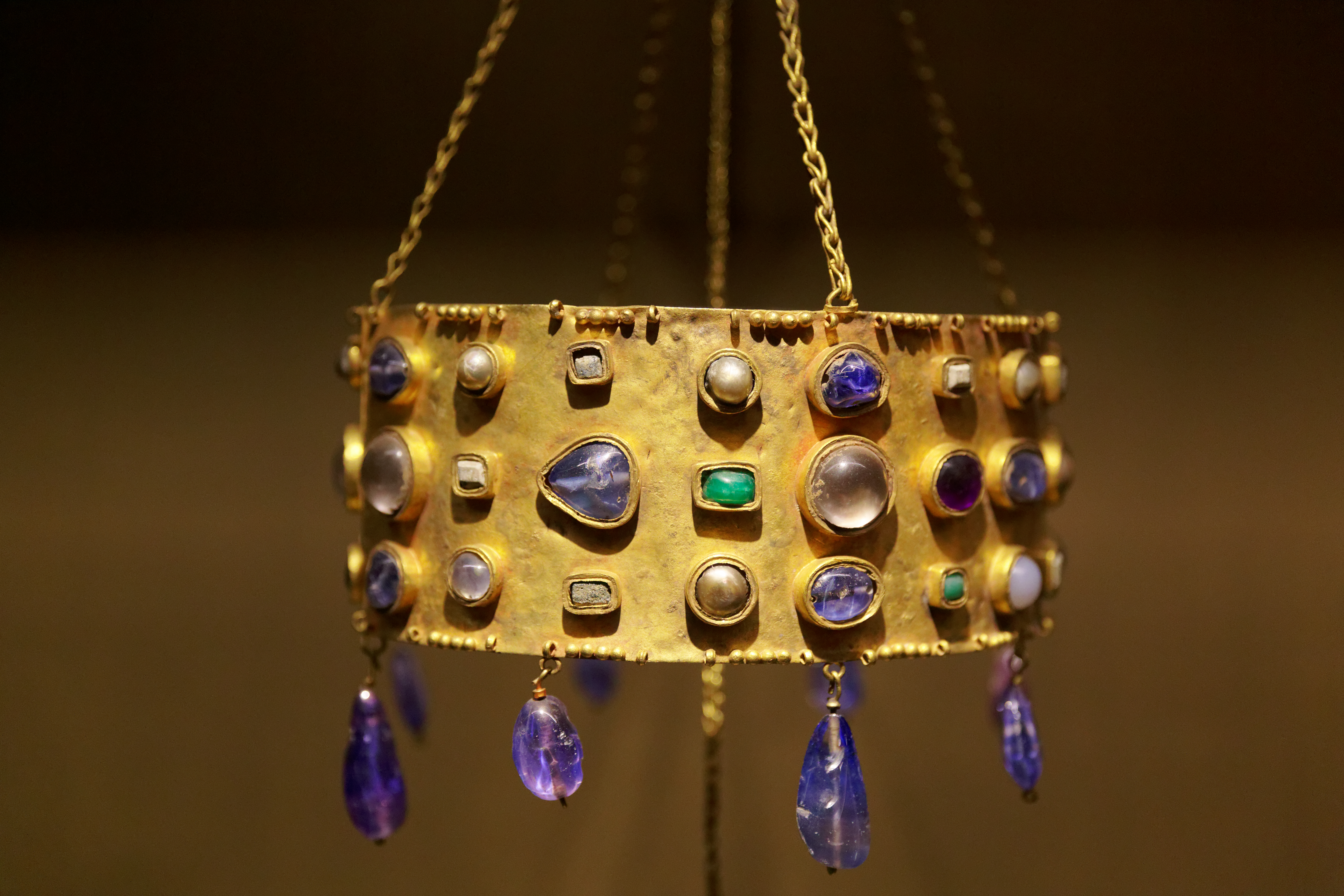 Couronne votive originaire d'Espagne wisigothique, datée du milieu du VIIe siècle. Elle est composée d'or, de saphirs, d'émeraudes, d'améthystes, de perles, de cristaux de roche, de nacre et de jaspe.